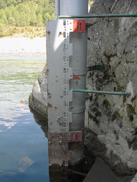 El nivel extraordinariamente bajo alcanzado por el Cinca durante la sequía del verano de 2005. Fotografía tomada en el nivel de Escalona, en su curso alto, donde se muestra con menos de 1m de profundidad dejando al descubierto algas y plantas acuáticas que en otros momentos crecían bajo el agua.